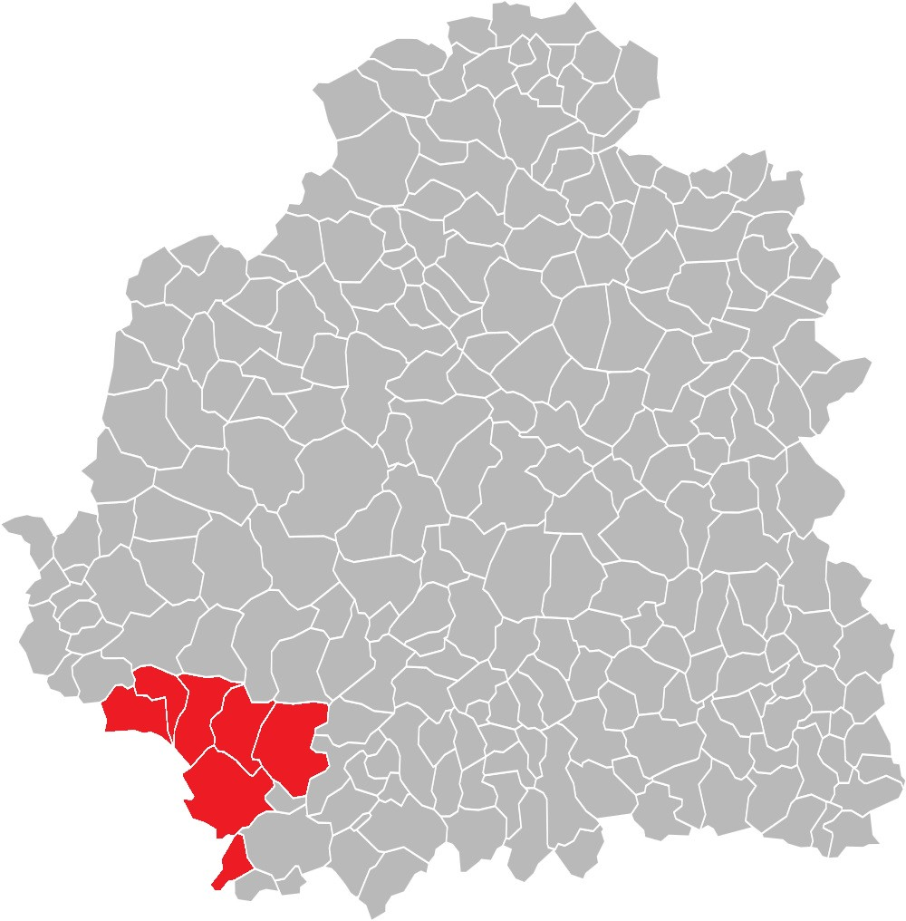 Carte des communes de l'Indre (36) : Le canton de Bélâbre, de 1790 à 2015.